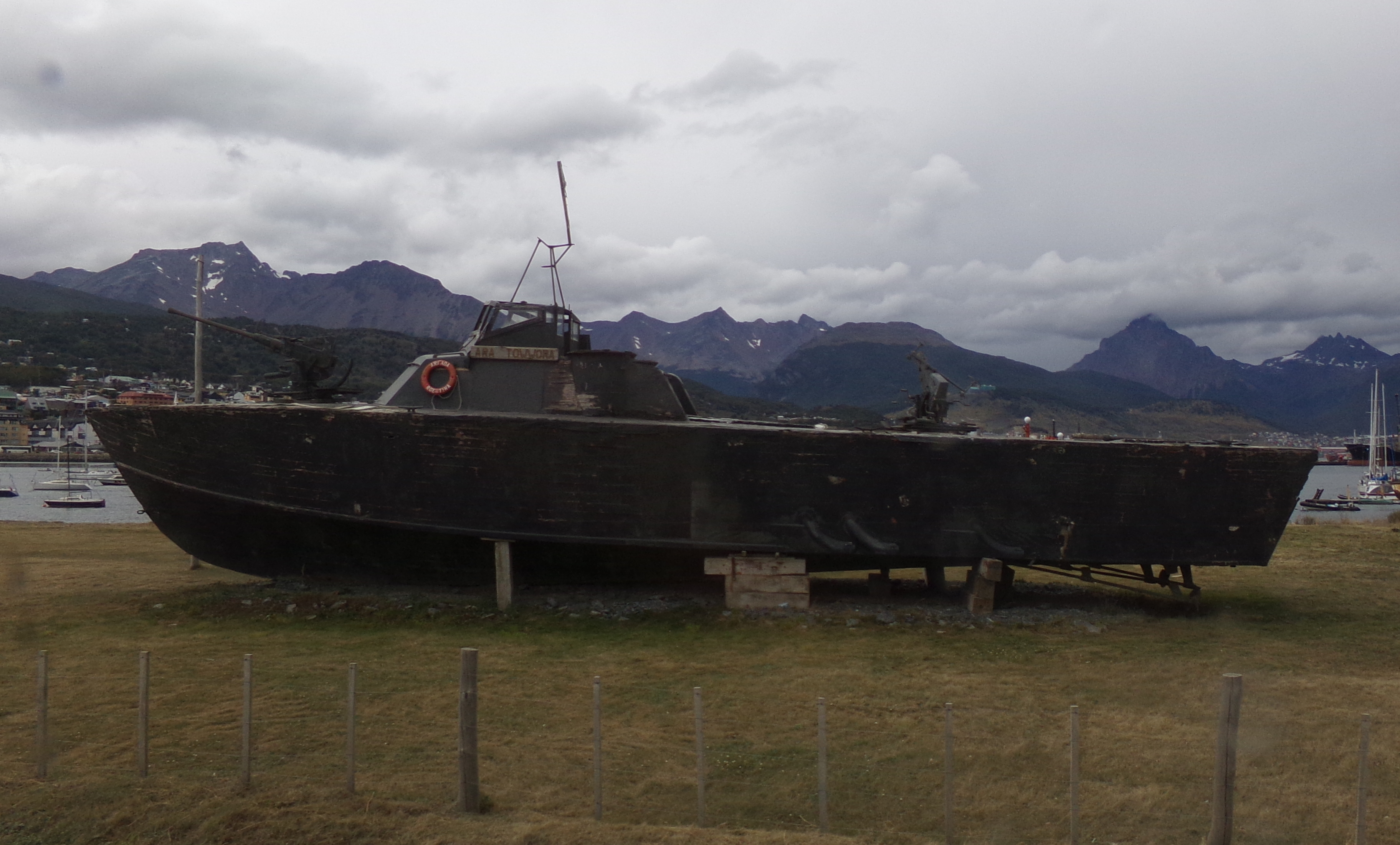 ARA Towwora en Bahía Ushuaia